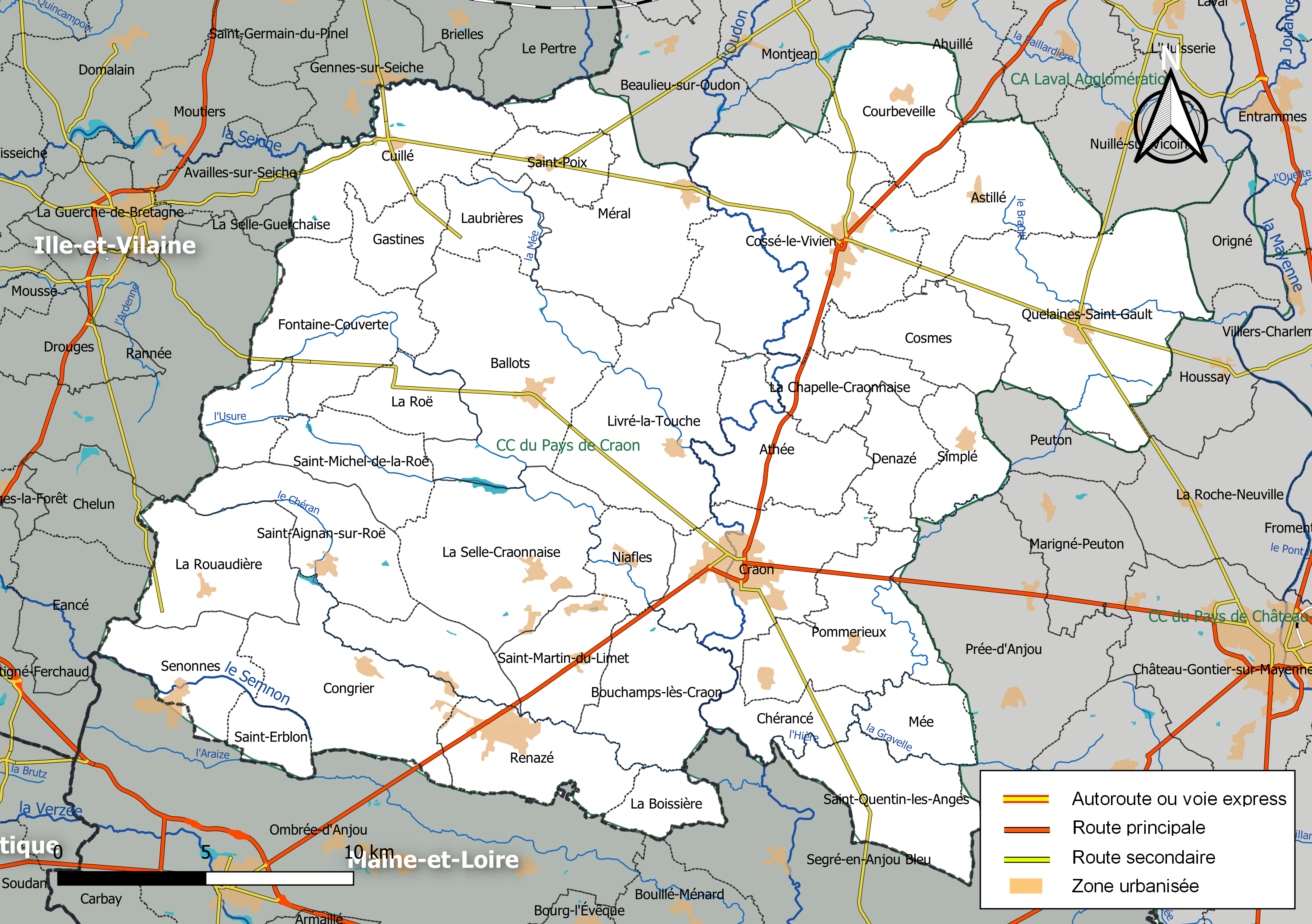 Carte géographique de la Communauté de communes du Pays de Craon, département de la Mayenne, France. Composition au 1er janvier 2019.